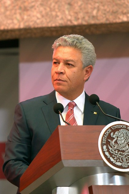 David Penchyna, senador de México de 2012 a 2015.